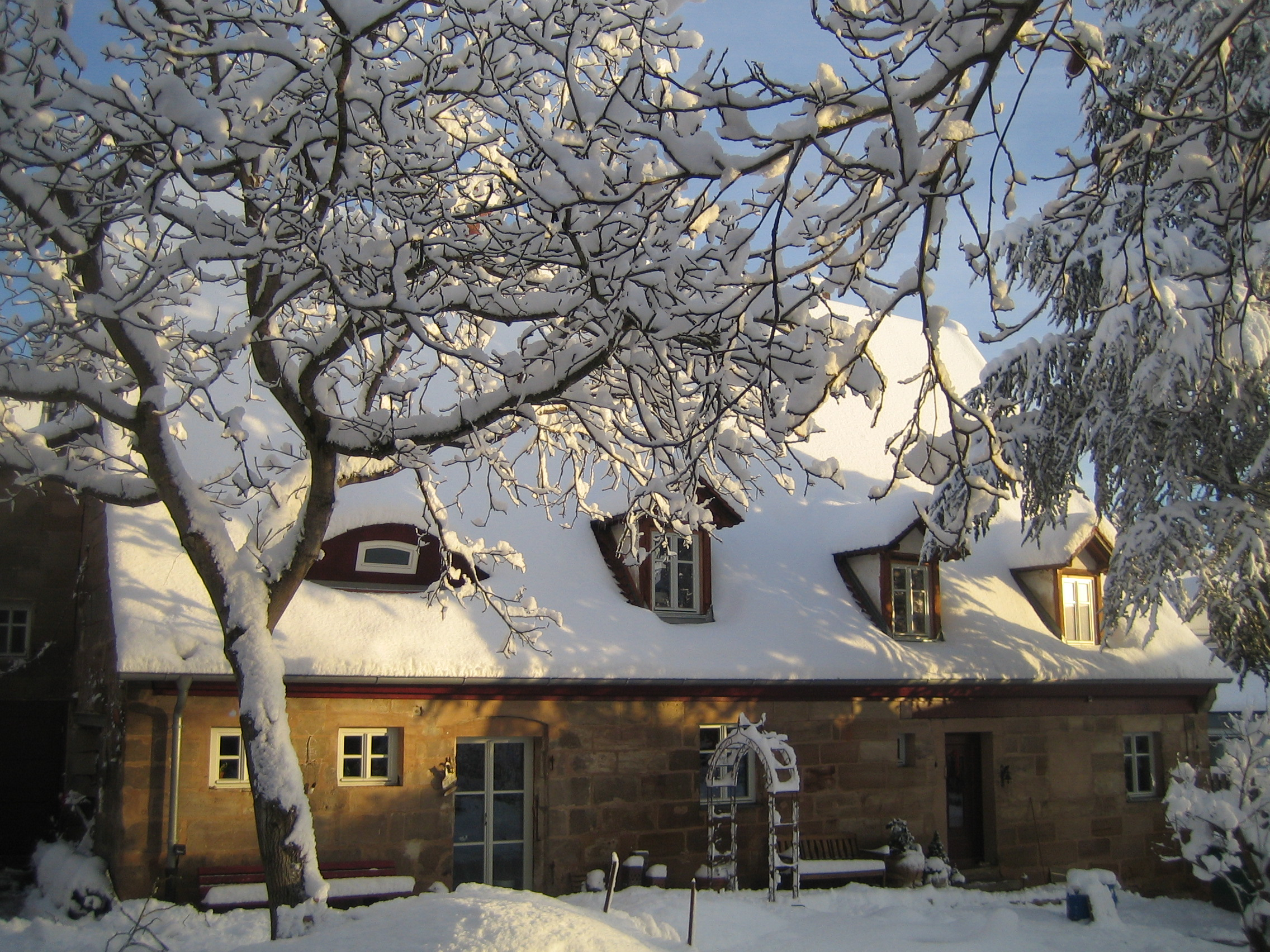 Flexdorfer Str. 30, Fürth: Bauernhaus